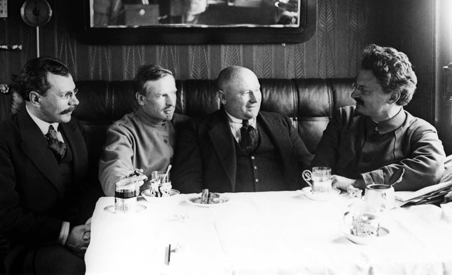 Лев Троцкий с гостями в вагоне штабного поезда (1920)